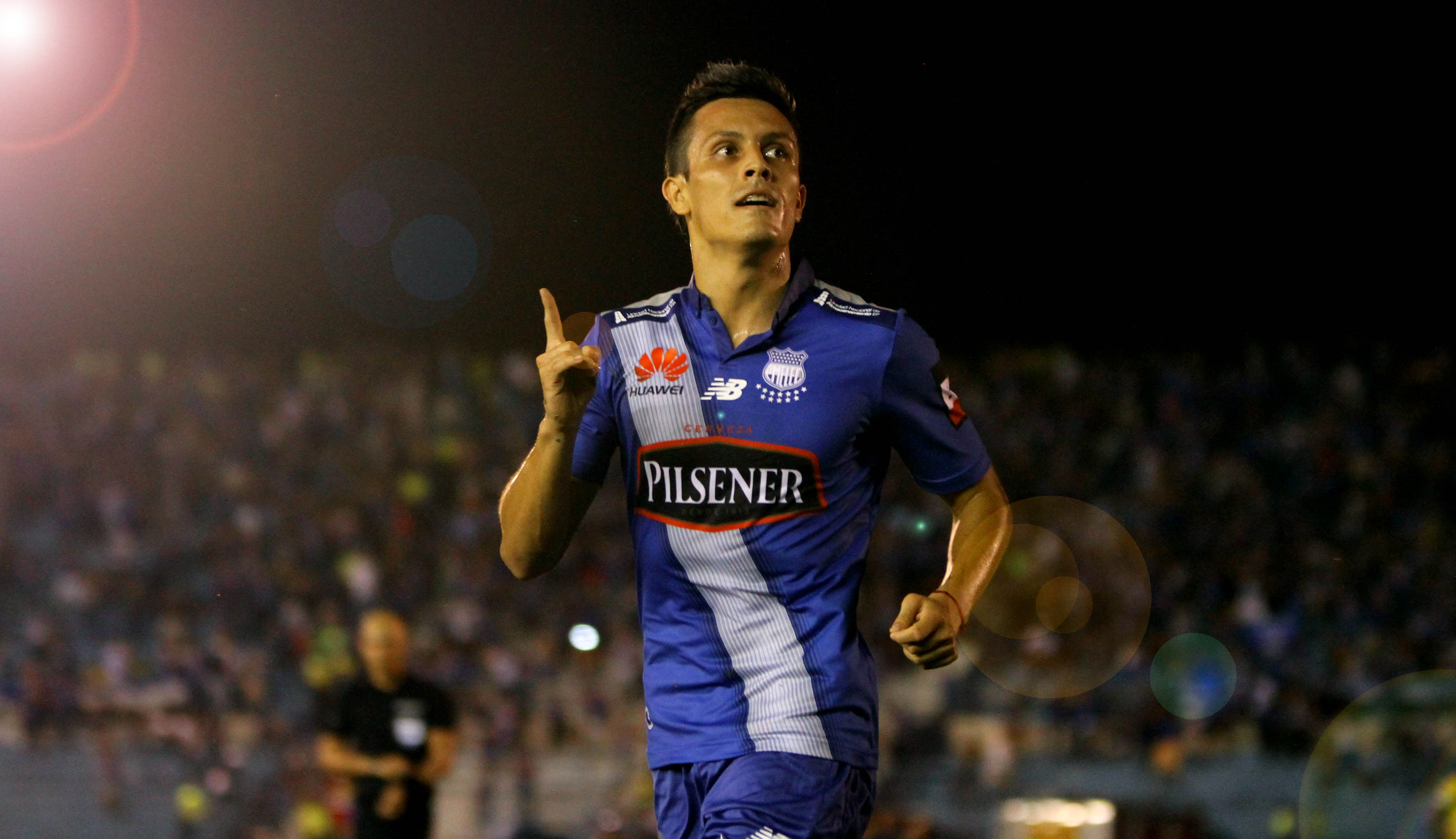 Guayaquil, domingo 08 de marzo del 2015 (ANDES).-En el estadio Alberto Spencer Emelec derrota 2X0 a Barcelona en la octava fecha del campeonato nacional de fútbol, Marcos Mondaini, anotó el segundo gol del partido